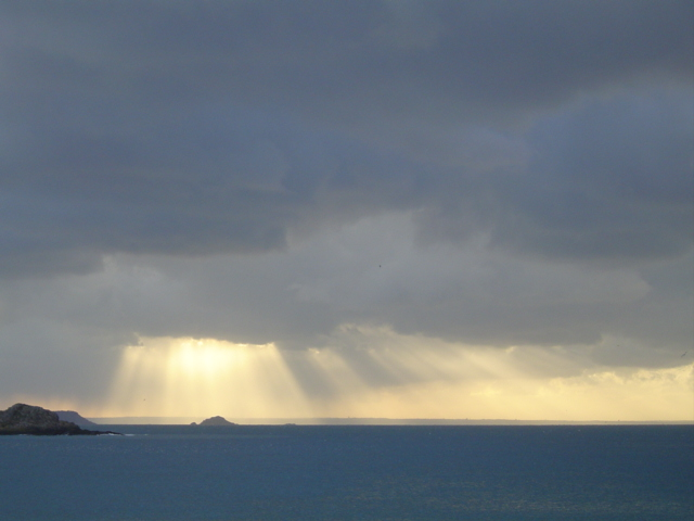 Le Verdelet vu de la plage d'Erquy (22) un soir d'été